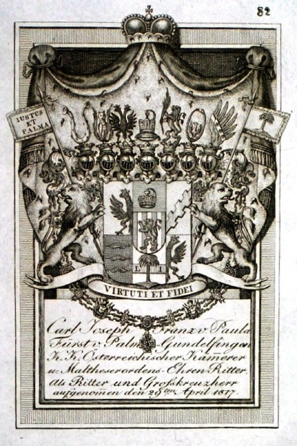 Wappen des Carl Joseph III. Franz von Paula, Fürsten v. Palm-Gundelfingen (1773-1851), K. K. Österr. Kämmerer, Ehrenritter des Malteserordens